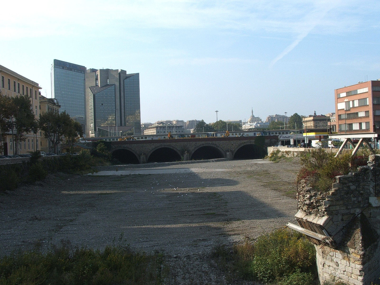 Genova - Il letto completamente in secca del torrente Bisagno in direzione della Foce nei pressi della stazione ferroviaria di Brignole. Sulla destra si intravvede l'antico ponte medioevale - costruito su una preesistente struttura romana - crollato durante le alluvioni degli anni settanta e novanta e mai più restaurato. Sulla sinistra si possono notare i grattacieli del moderno complesso di Corte Lambruschini, costruiti (in particolare il parcheggio interrato di 4 piani) nell'alveo del torrente per cui costituiscono ostacolo al deflusso delle piene. Nel corso dell'alluvione del 9-10 ottobre 2014 il Bisagno ha completamente inondato il parcheggio, causando la perdita di oltre 100 automobili ivi presenti in quel momento. Foto di Rinina25 & Twice25 - ottobre 2005